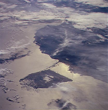 A satellite image of Paraguaná Peninsula in Venezuela.